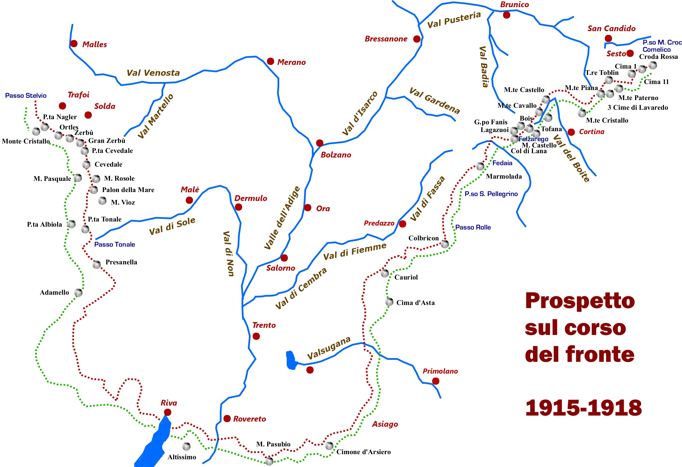 schema del settore dolomitico